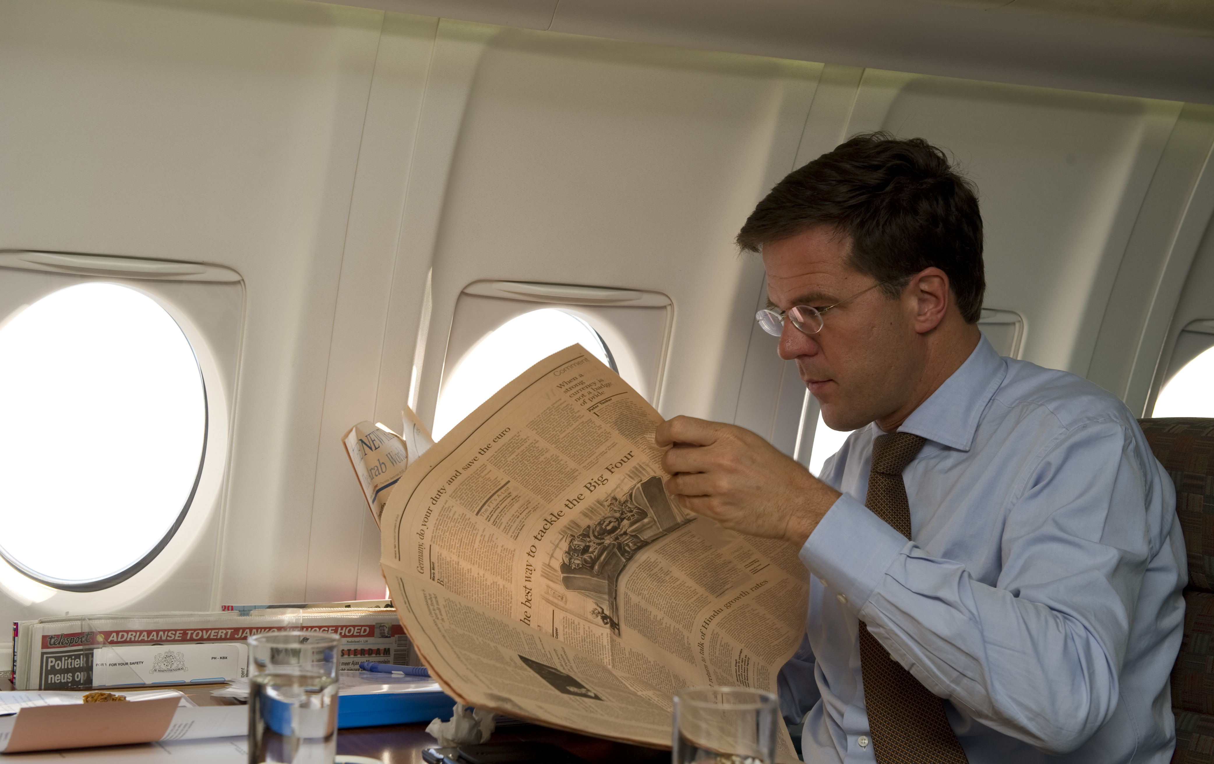 Minister-president Rutte leest de Financial Times aan boord van het regeringsvliegtuig op weg naar de Top van het Oostelijk Partnerschap in Warschau. Tijdens deze top komen EU-landen en oostelijke buurlanden van de Europese Unie bijeen. De top wordt voorgezeten door huidig EU-voorzitter Polen. Ruim twee jaar geleden is het Oostelijk Partnerschap gelanceerd als instrument om de samenwerking, de politieke toenadering en economische integratie van de oostelijke buurlanden met de Europese Unie te versterken. Tijdens de top in Warschau wordt de voortgang van het Oostelijk partnerschap besproken. Het regeringsvliegtuig heeft de registratie PH-KBX. PH is de internationale luchtvaartcode voor Nederland, KBX staat voor Koningin Beatrix. Het regeringsvliegtuig is een Fokker Executive Jet 70 en biedt plaats aan 24 personen.